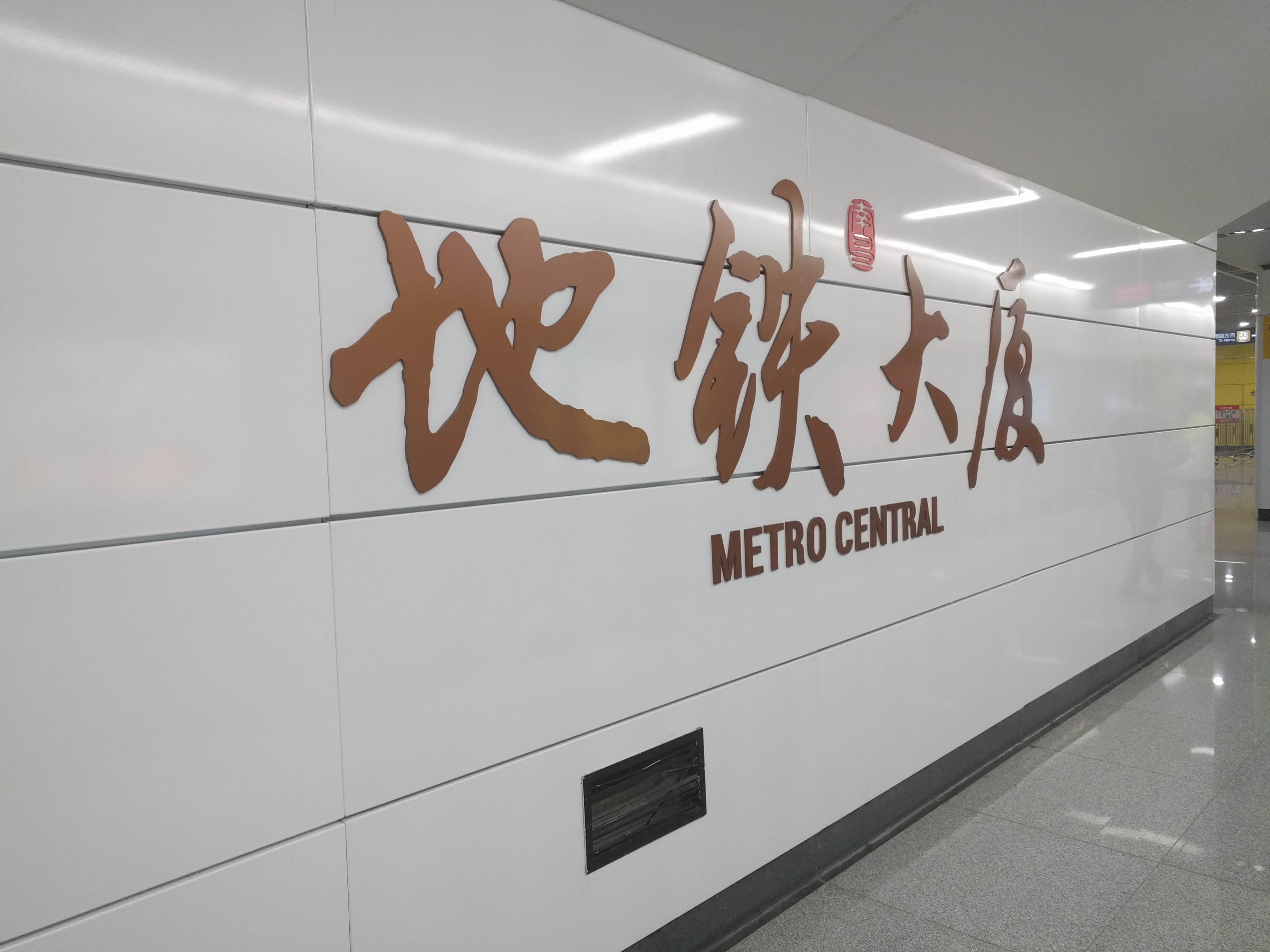 地铁大厦站2号线站台字壁